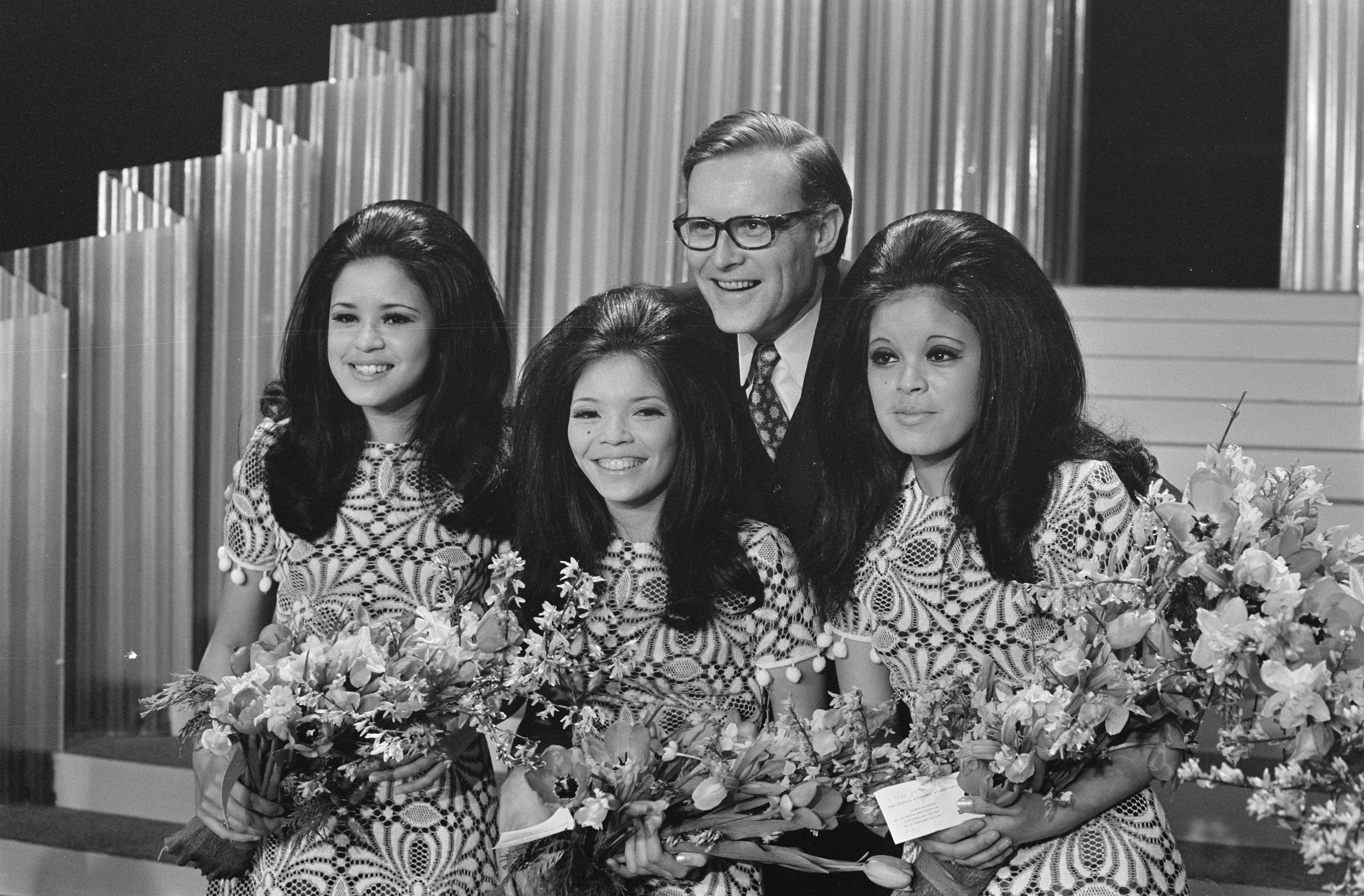 Collectie / Archief : Fotocollectie Anefo Reportage / Serie : [ onbekend ] Beschrijving : The Hearts of Soul , winnaars op Nederlandse finale Eurovisie Songfestival in Den Haag . The Hearts of Soul met tekstdichter Pieter Goemans Datum : 11 februari 1970 Locatie : Den Haag, Zuid-Holland Trefwoorden : popmuziek, songfestivals, zangers Persoonsnaam : Goemans, Pieter Instellingsnaam : Eurovisie Song Festival Fotograaf : Verhoeff, Bert / Anefo Auteursrechthebbende : Nationaal Archief Materiaalsoort : Negatief (zwart/wit) Nummer archiefinventaris : bekijk toegang 2.24.01.05 Bestanddeelnummer : 923-2496